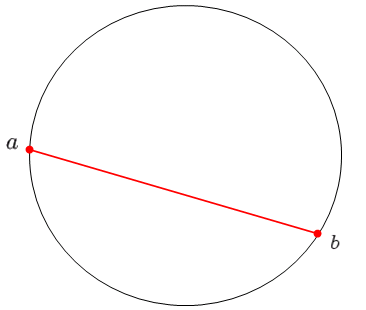 Cięciwa. Praca tego wikipedysty, zrobiona w Microsoft Word.